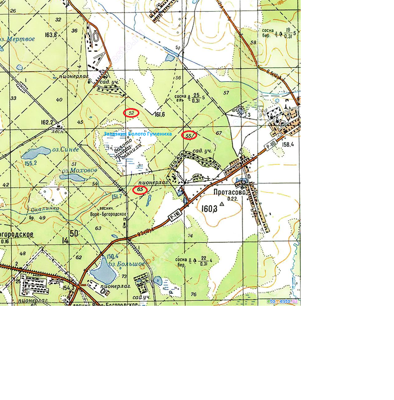 Заказник Болото Гумениха (Щелковский район) на карте красными кружками выделены номера кварталов лесничества